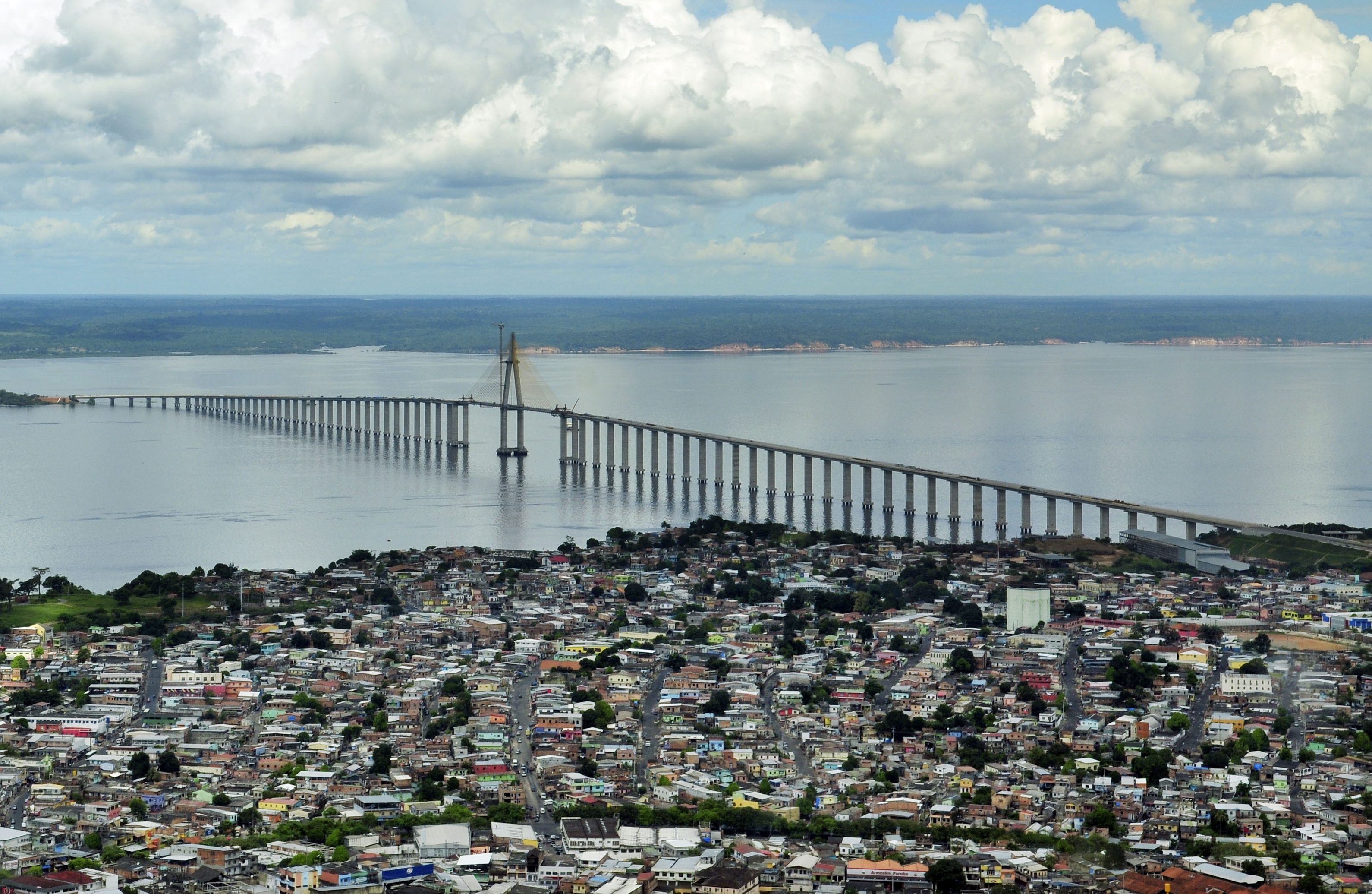 Ponte Rio Negro, Manaus, Brasil.